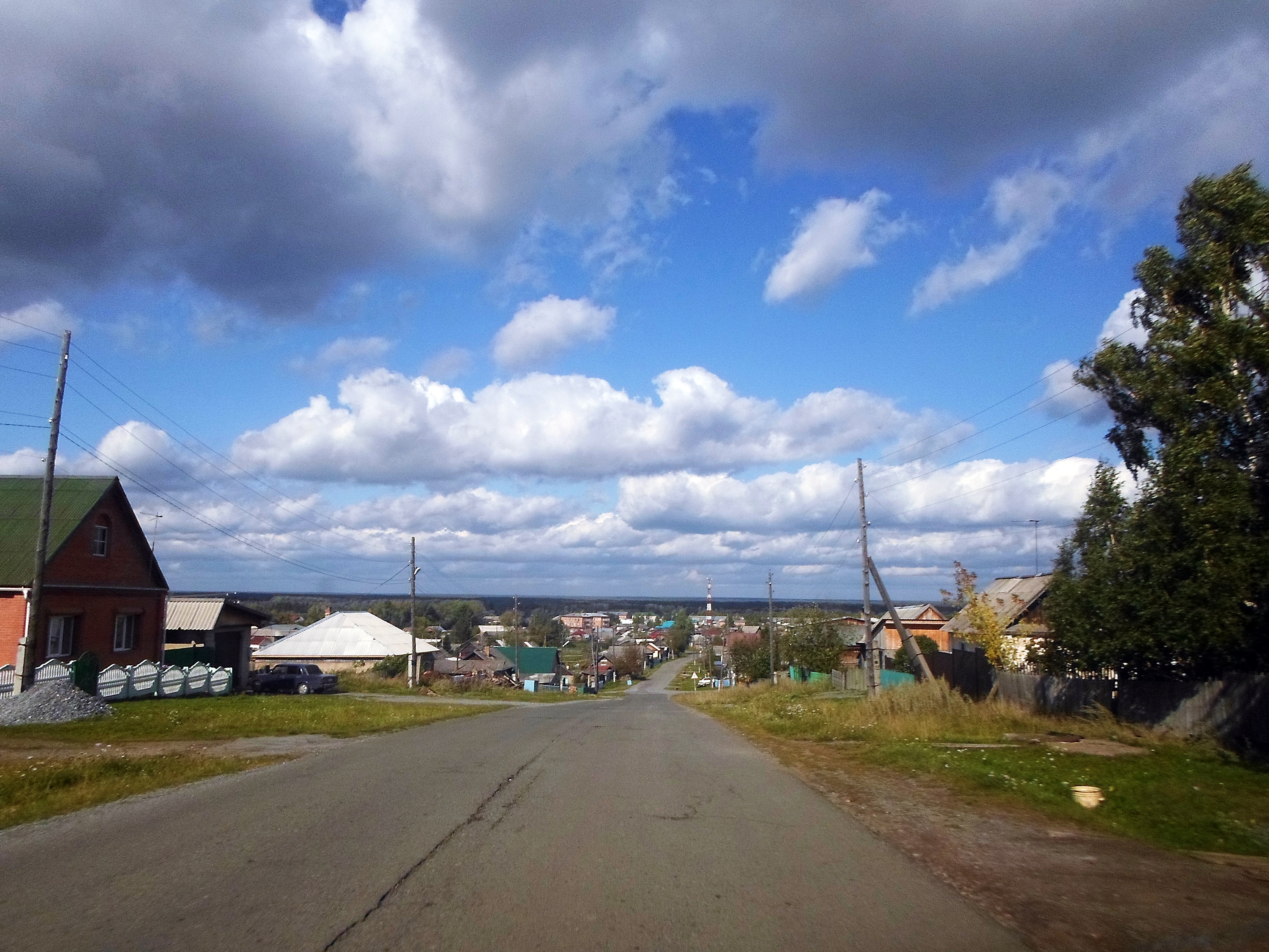 Село Большой Улуй Красноярского края. Вид с востока.